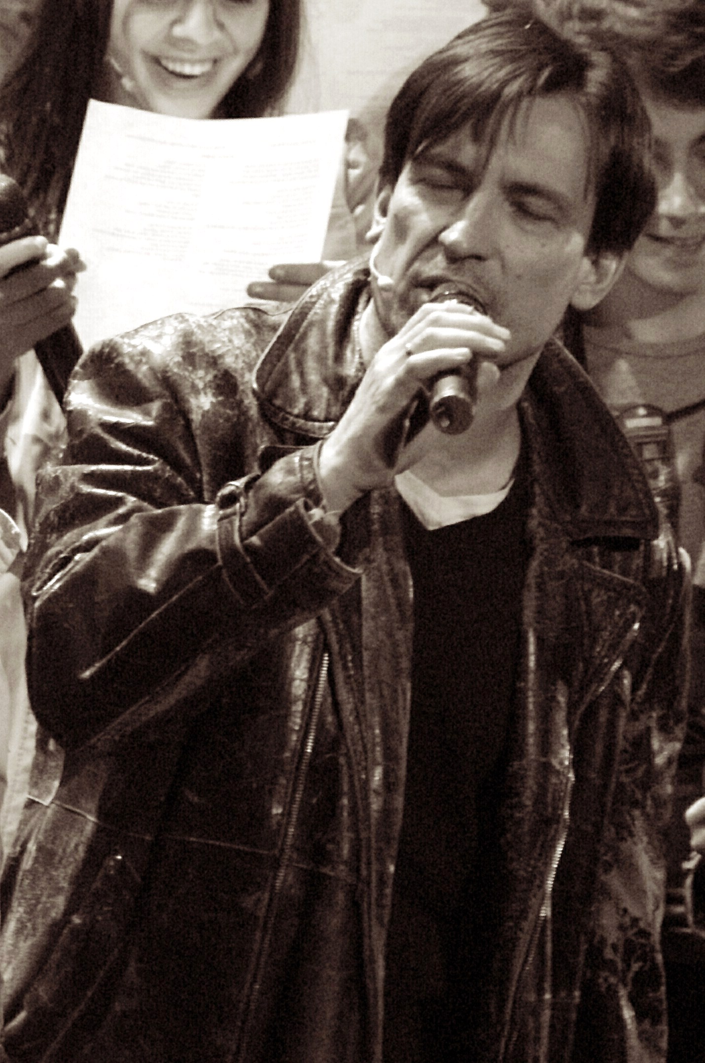 Dariusz Kordek.